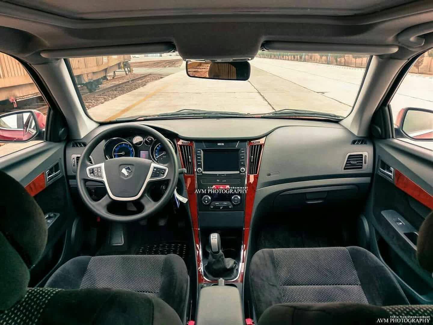 خودروی ملی - دناپلاس ایران خودرو - IKCO Dena plus